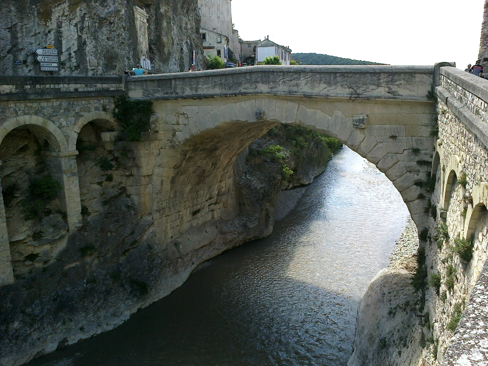 Vaucluse Vaison-La-Romaine Pont Romain